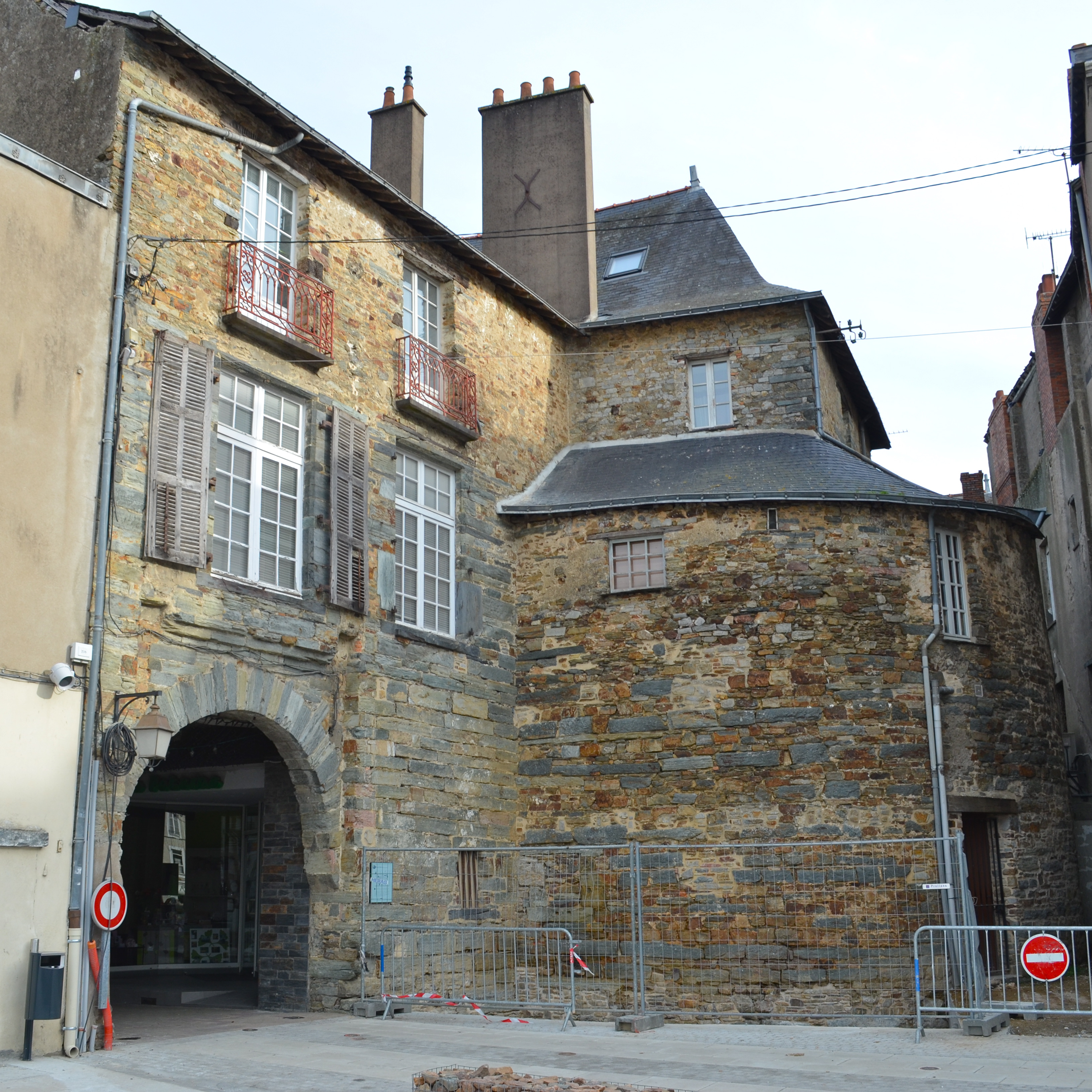 Porte Neuve - Châteaubriant (Loire-Atlantique)